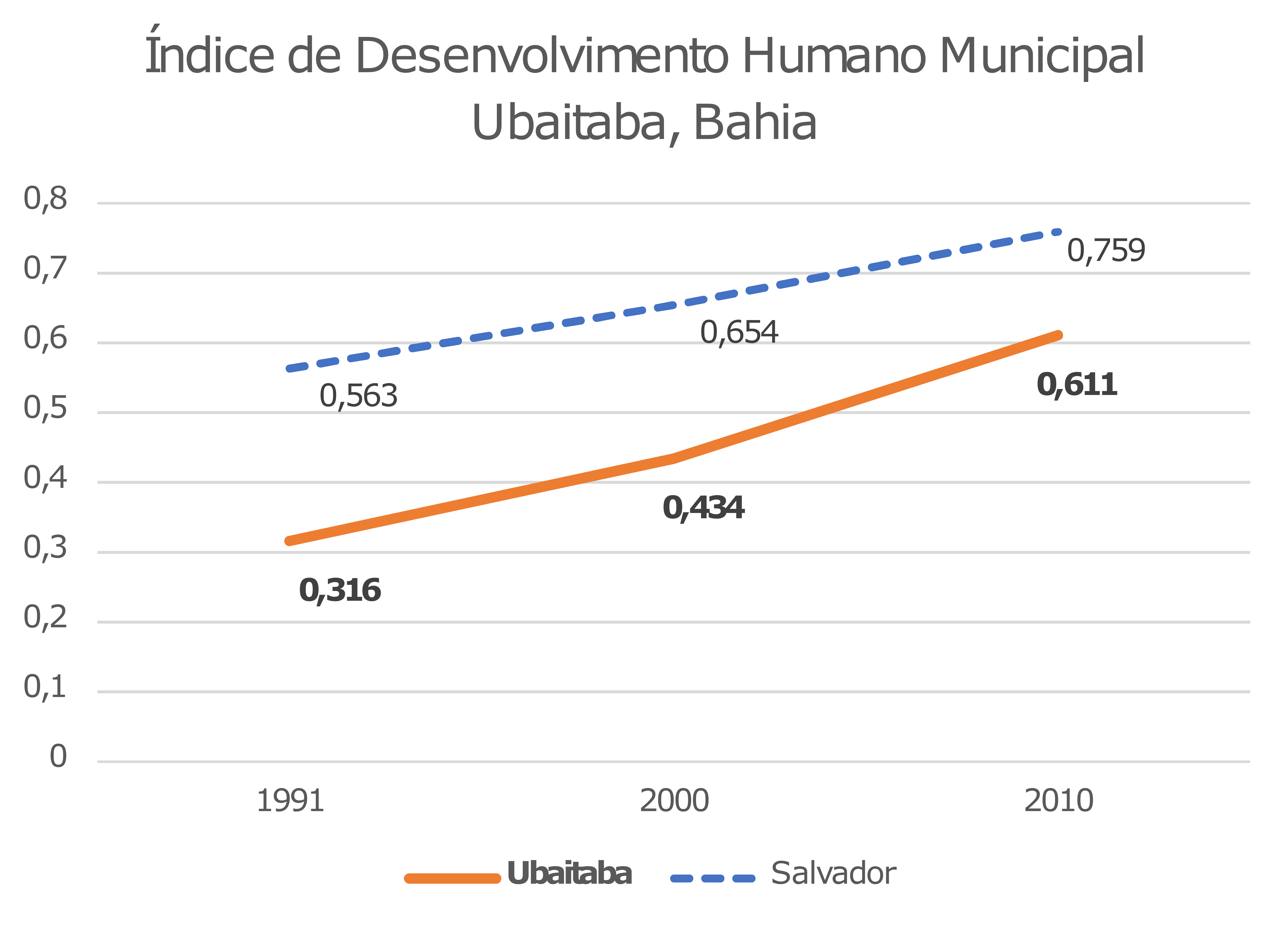 Indice de Desenvolvimento Humano Municipal Ubaitaba, Bahia